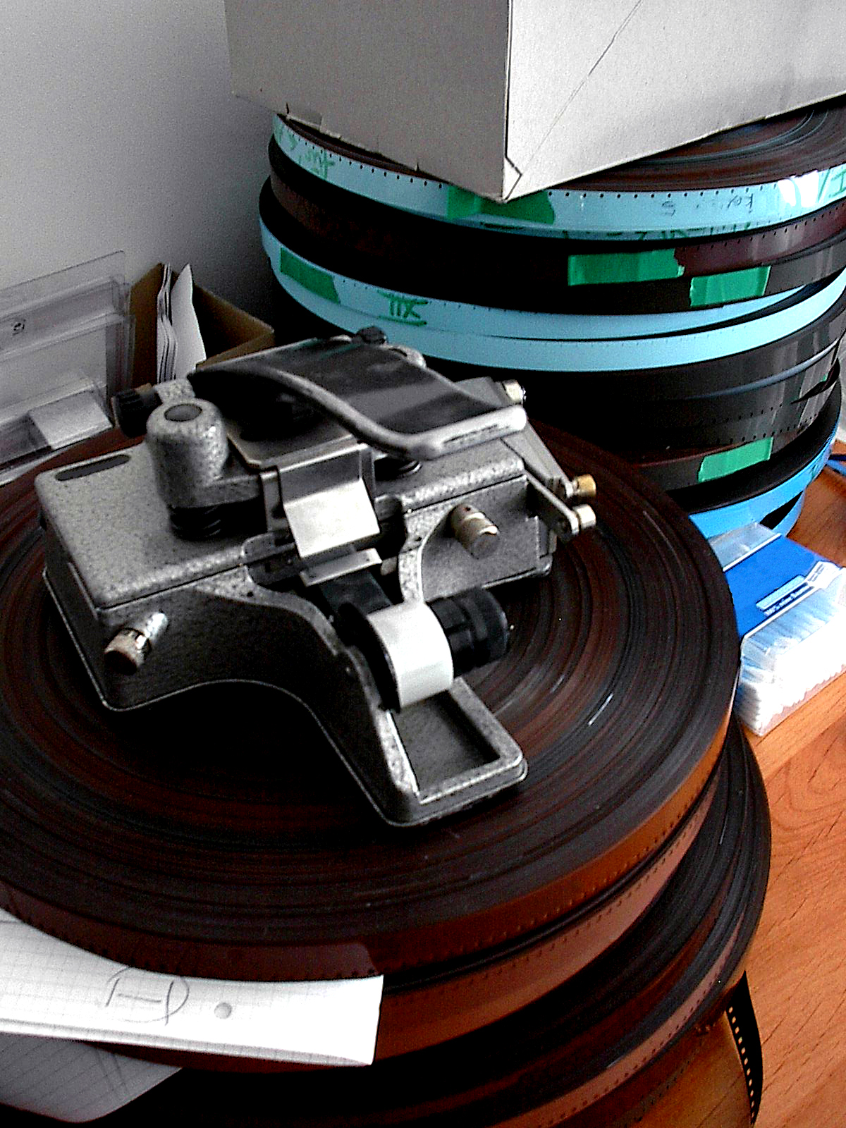 Perforierte Tonbänder mit Schneidelade zur Filmtonpostproduktion